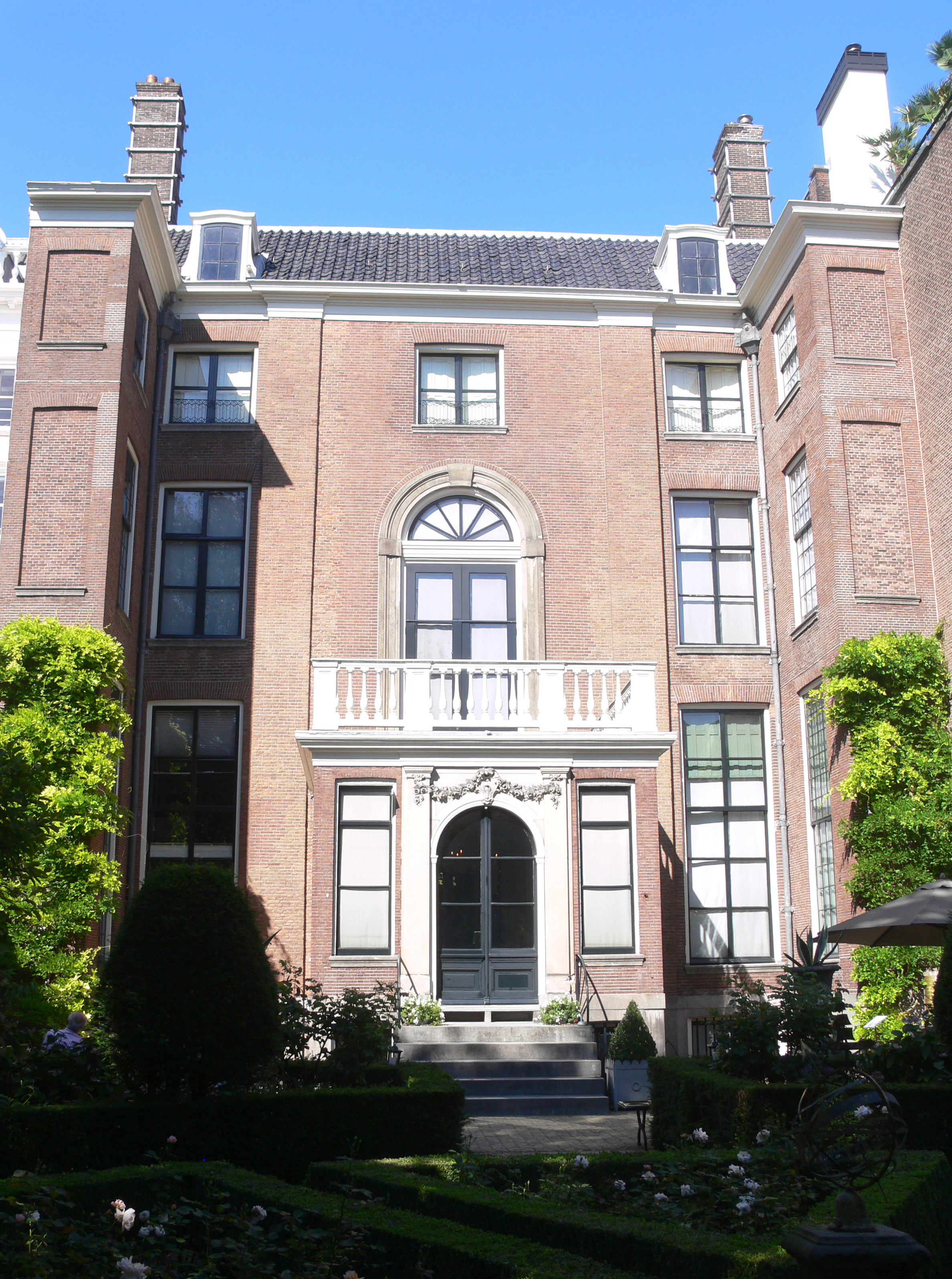 Amsterdam - Museum Van Loon